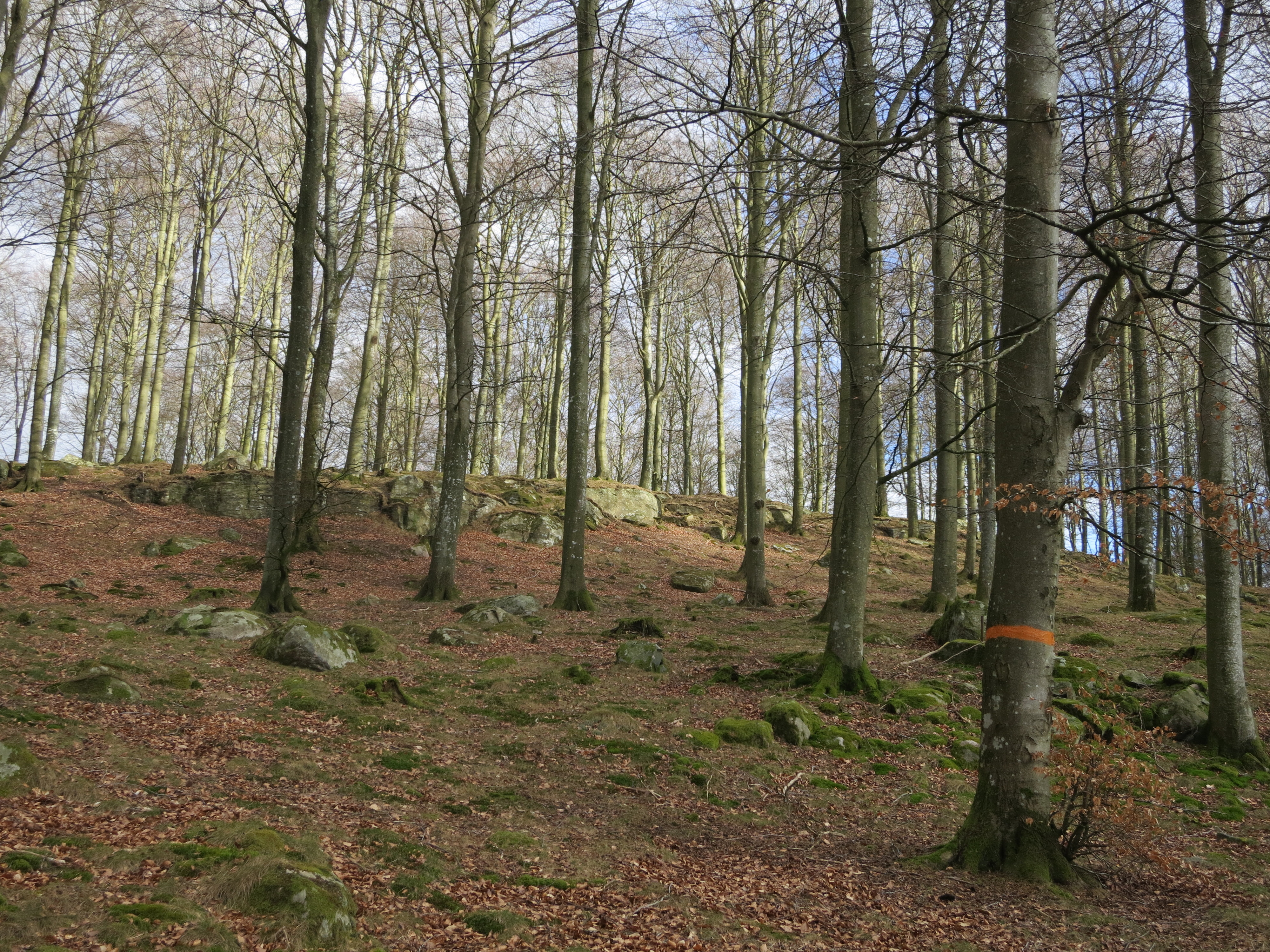 Bokskog på Göingeåsen vid Tormestorp